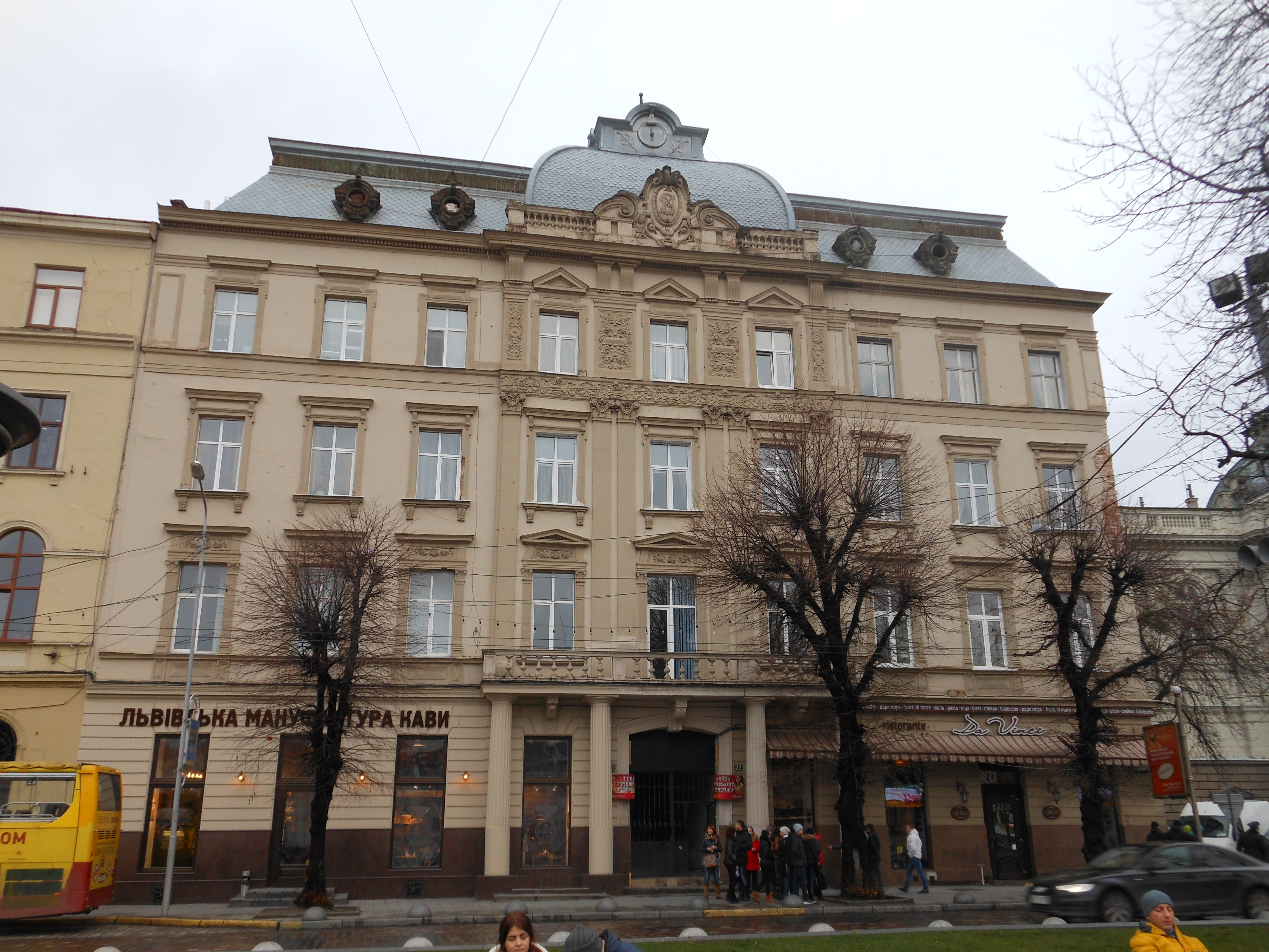 Житловий будинок, в якому жив Гжицький В.З, український письменник, Львів, Свободи пр., 22